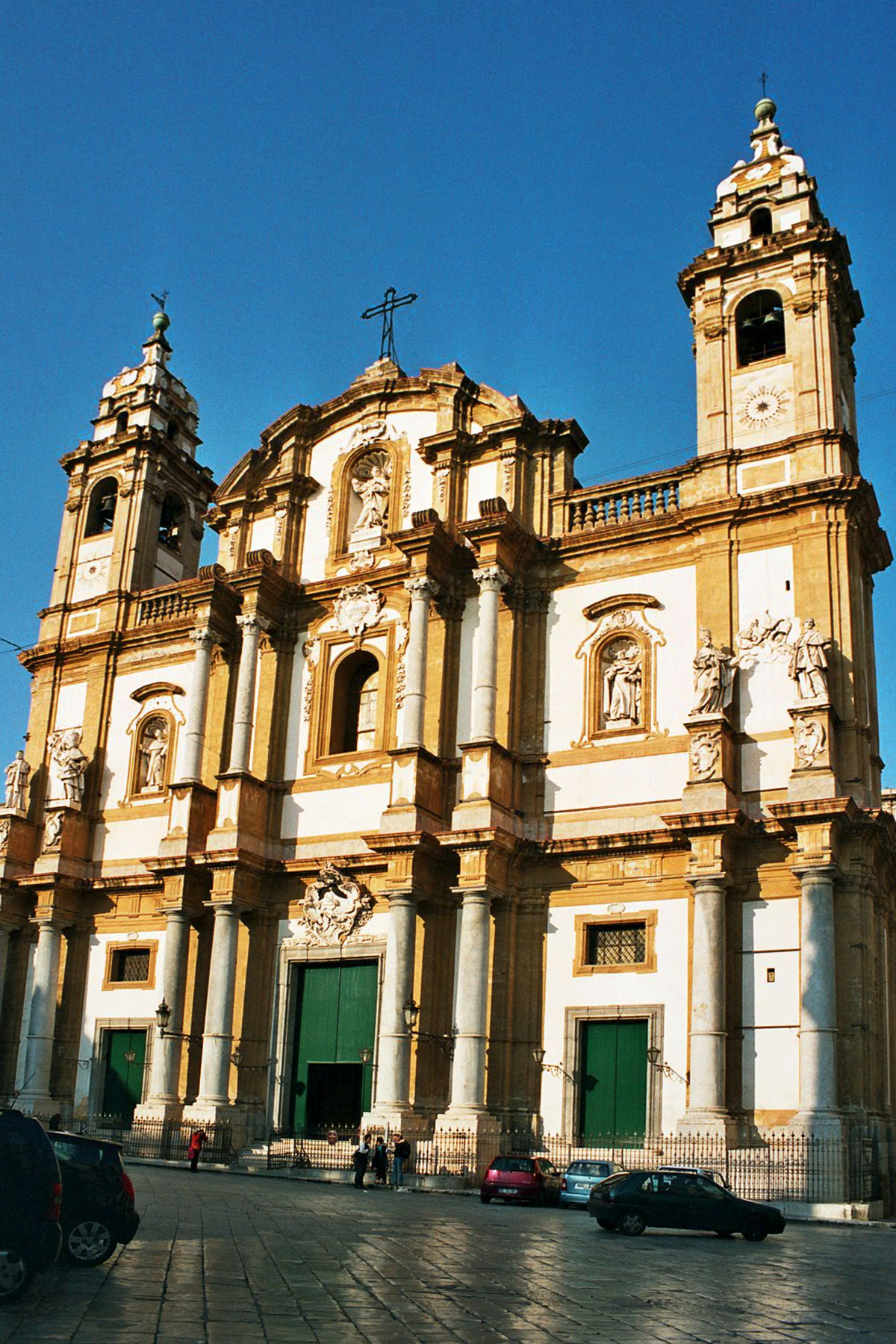 San Domenico, Palermo